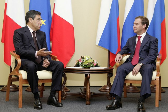 ЯРОСЛАВСКАЯ ОБЛАСТЬ, Ярославль. На конференции «Современное государство и глобальная безопасность». С Премьер-министром Франции Франсуа Фийоном.